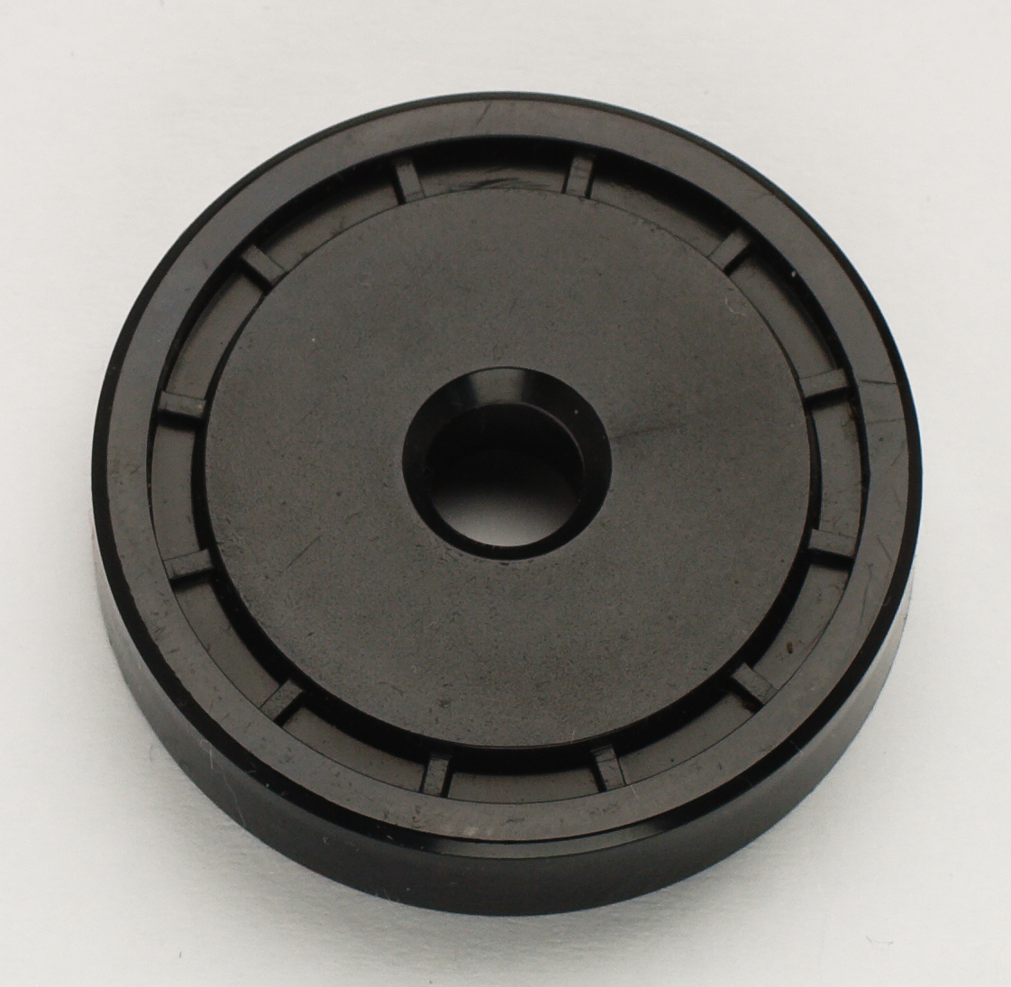 Oberseite eines Pucks. Es handelt sich um einen Adapter zum Abspielen von Singles auf Plattenspielern. Dieses Exemplar aus Plastik stammt von Anfang der 1990er Jahre (mitgeliefertes Zubehör für den Plattenspieler eines Universum-Stereoturms).